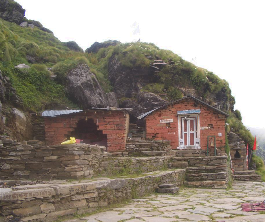 Rudranath, garhwal